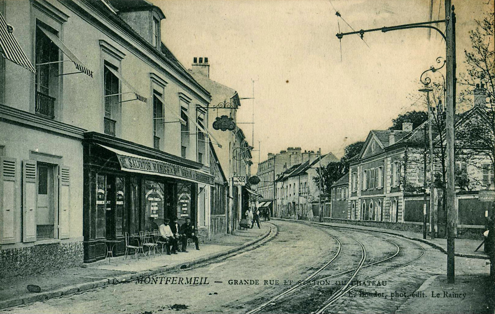 Carte postale ancienne éditée par E. Boudot, phot. - édit. Le RaincyMONTFERMEIL - Grande-Rue et station du Château